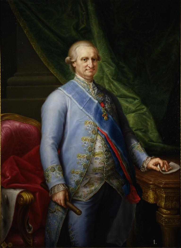 Retrato del rey Carlos IV de España (1748-1819), que era hijo del rey Carlos III y de María Amalia de Sajonia.